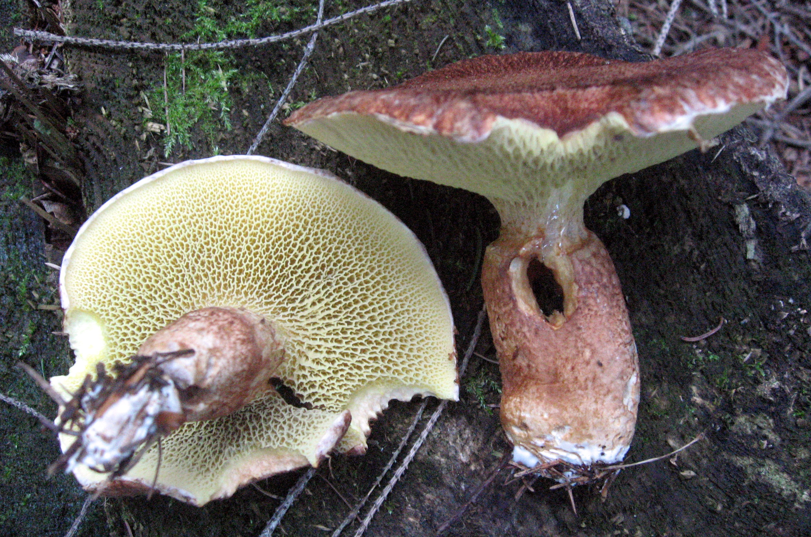 Hřib dutonohý, hnědá variantaLatina: Boletus cavipes